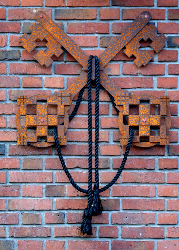 Boalsert, Sint-Fransicustsjerke, earetekens basilyk